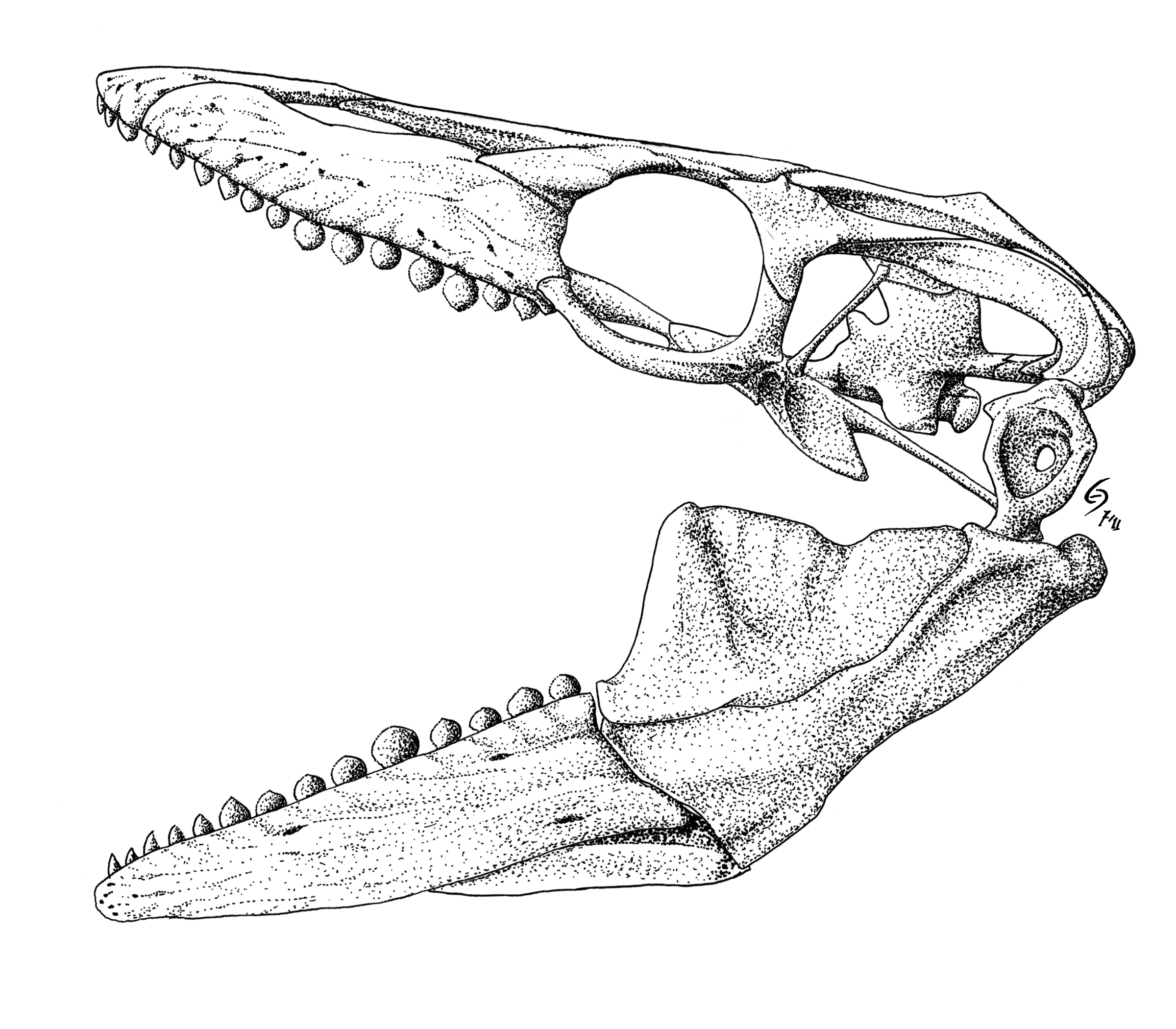 Skull of Globidens dakotensis.